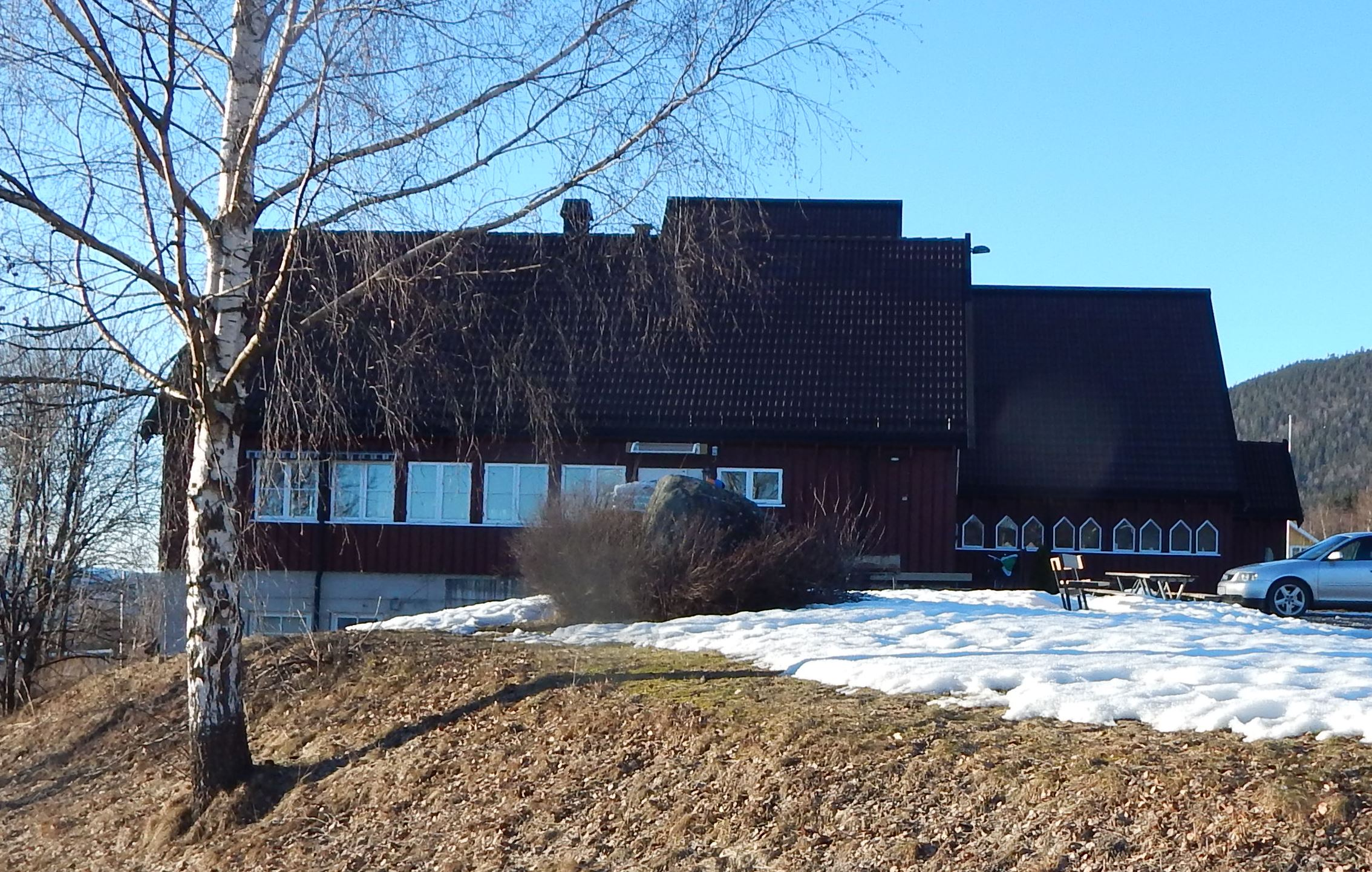 Lillehammer baptistkirke